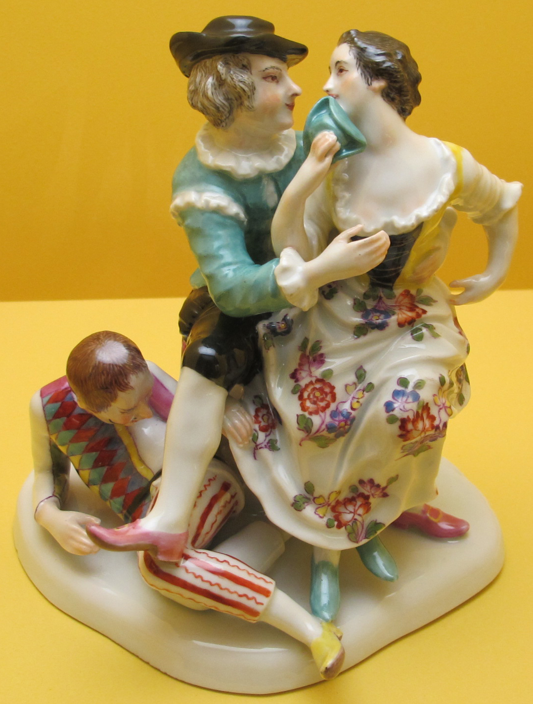 Fürstenberg, simon feilner, due amanti con arlecchino ai loro piedi, 1755-60 ca.